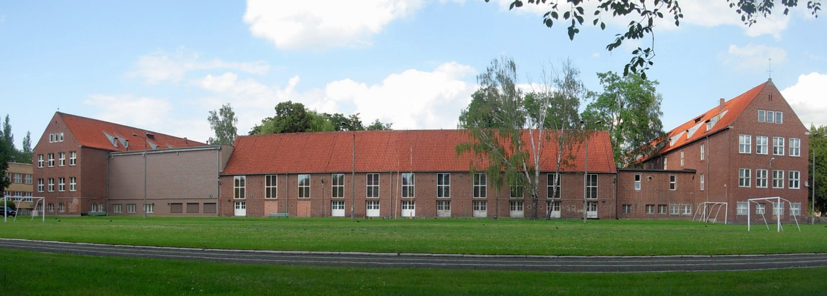 Główny kampus między ul. Chodkiewicza, a ul. Powstańców Wlkp należący do Uniwersytetu Kazimierza Wielkiego w Bydgoszczy